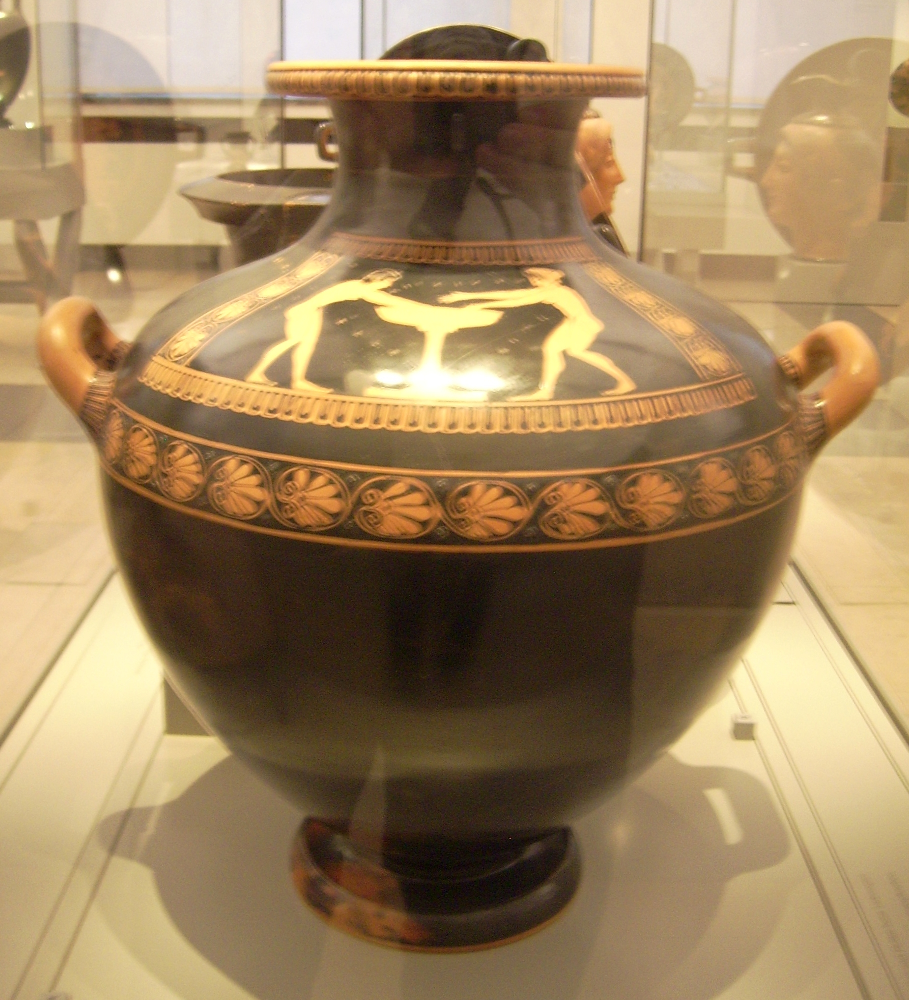 Hetären am Wasserbecken. Attisch-rotfigurige Hydria der Pioniergruppe (zugeschrieben), um 510 v. Chr. Antikensammlung Berlin/Altes Museum